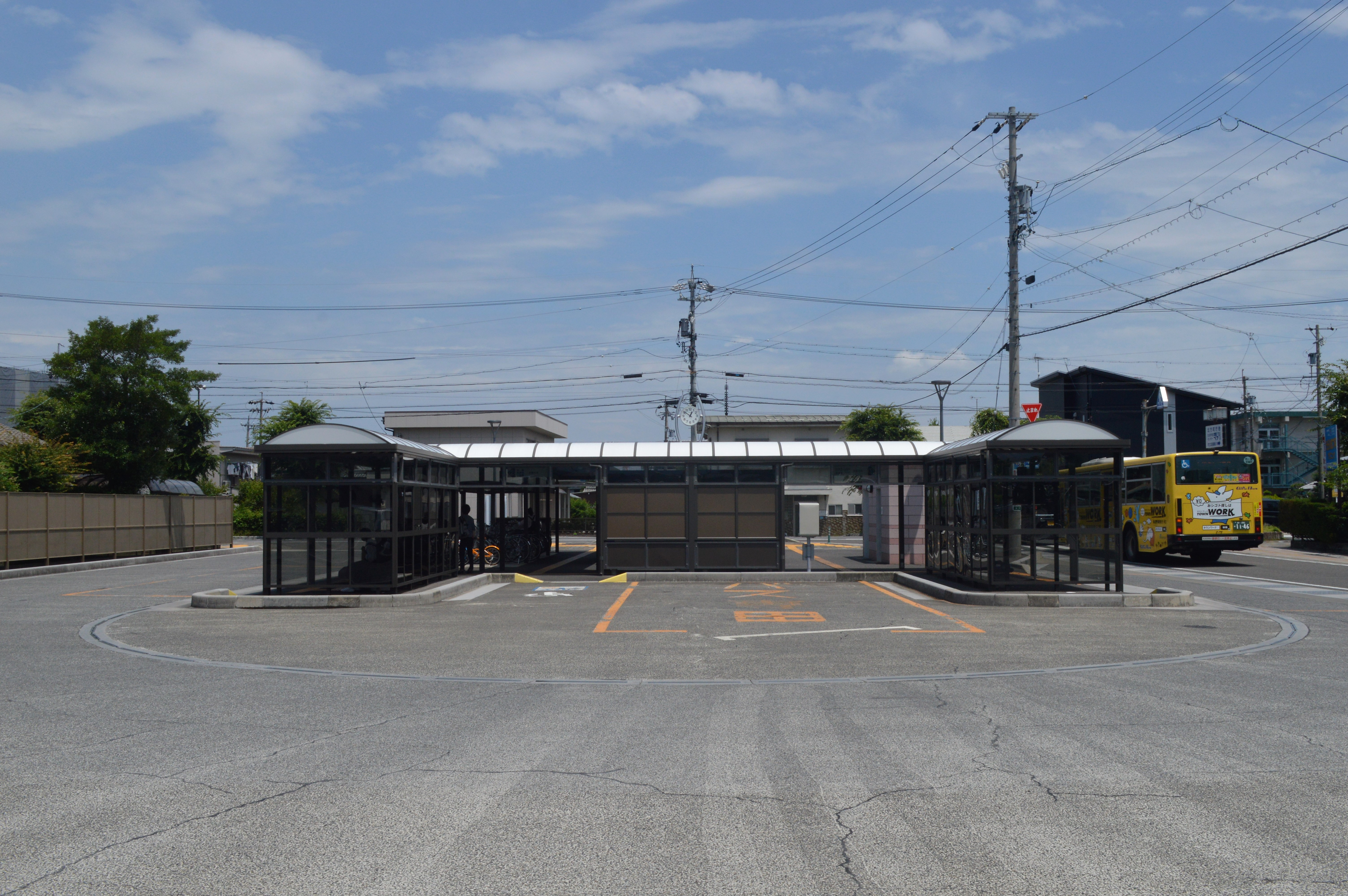 岐阜県本巣郡北方町にある北方バスターミナル。